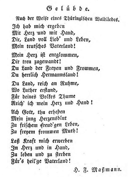 Ich hab mich ergeben, Erstdruck 1823